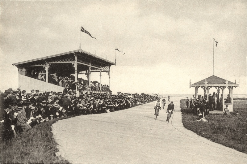 Cykelbanen på Vejlby Fed, 1898